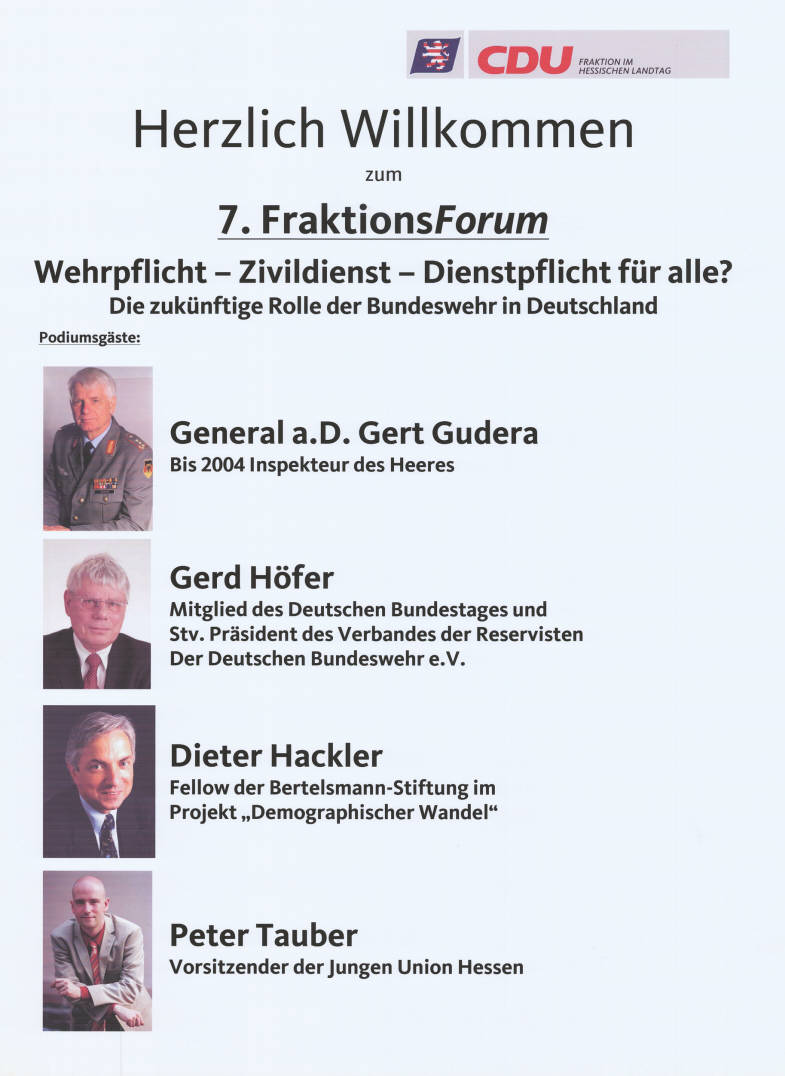 Herzlich Willkommen zum 7. FraktionsForum Wehrpflicht - Zivildienst - Dienstpflicht für alle? Die zukünftige Rolle der Bundeswehr in Deutschland Podiumsgäste: General a.D. Gert Gudera Bis 2004 Inspekteur des Heeres Gerd Höfer MdB ... Dieter Hackler Fellow der Bertelsmann-Stiftung ... Peter Tauber Vorsitzender der Jungen Union HessenAbbildung:PorträtfotosPlakatart:AnkündigungsplakatAuftraggeber:CDU Fraktion im Hessischen LandtagObjekt-Signatur:10-031 : 77Bestand:CDU-Plakate (10-031)GliederungBestand10-18:CDU-Plakate (10-031) » Parteitage, ParteikongresseLizenz:KAS/ACDP 10-031 : 77 CC-BY-SA 3.0 DE